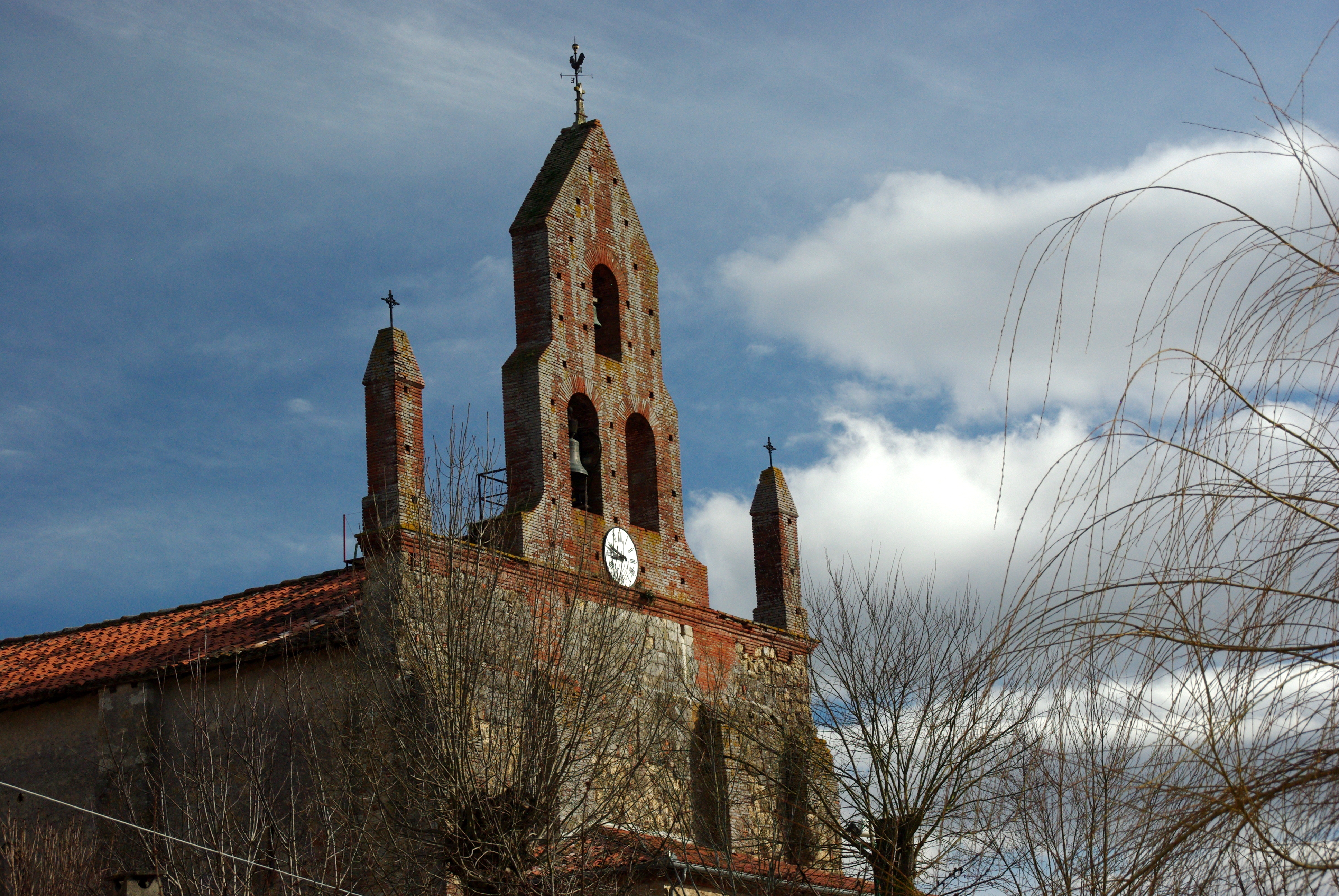 Église Sainte-Suzanne de Sainte-Suzanne, (Classé, 1989) .